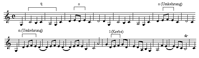 Ausschnitt aus der 1. Sinfonie von Johannes Brahms